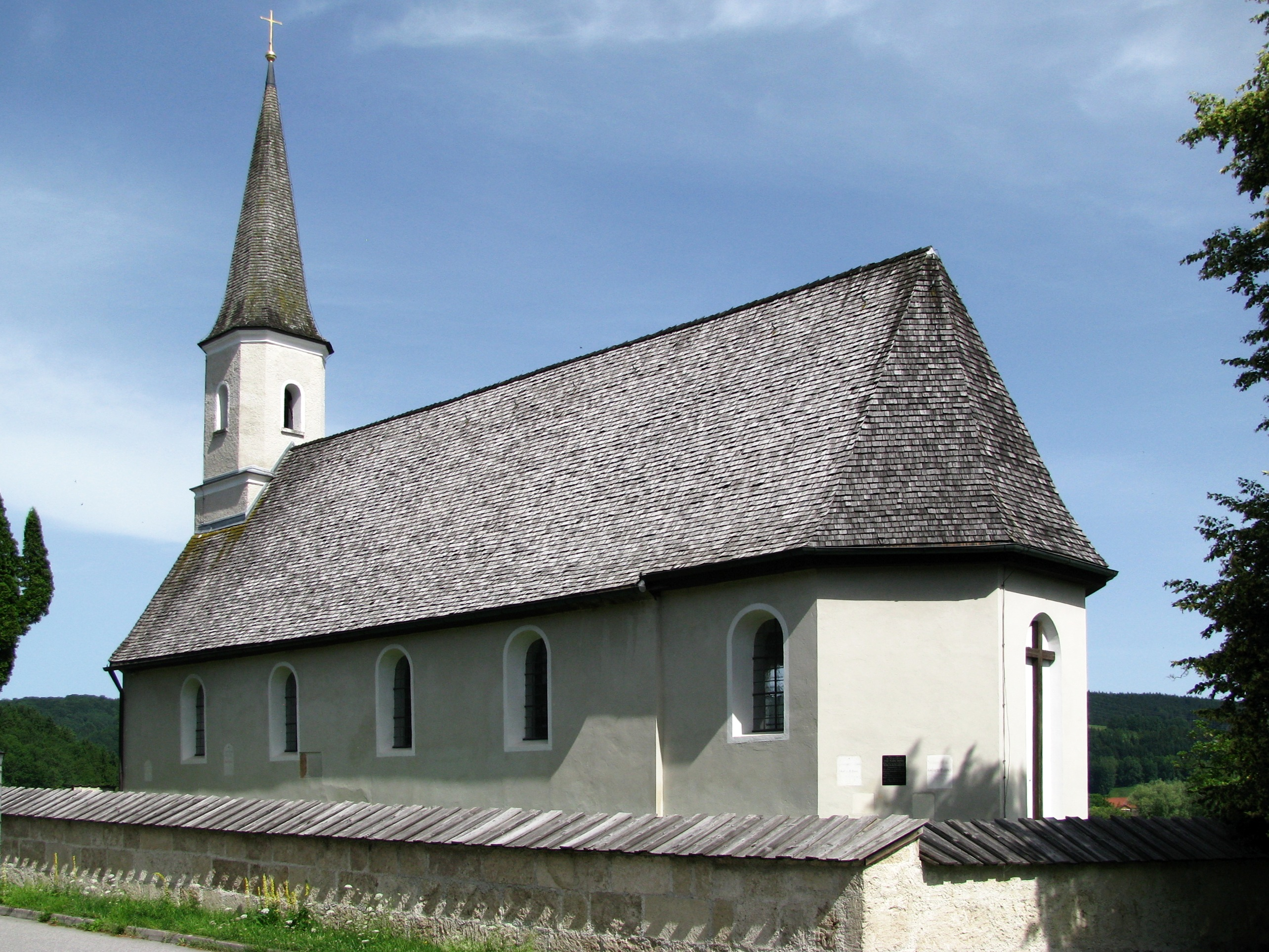 Katholische Filialkirche St. Georg in Großweil; barockisierter Saalbau mit Westturm, im Kern spätgotisch, 18. Jh. umgestaltet, Turm und Verlängerung 1835. This is a photograph of an architectural monument.